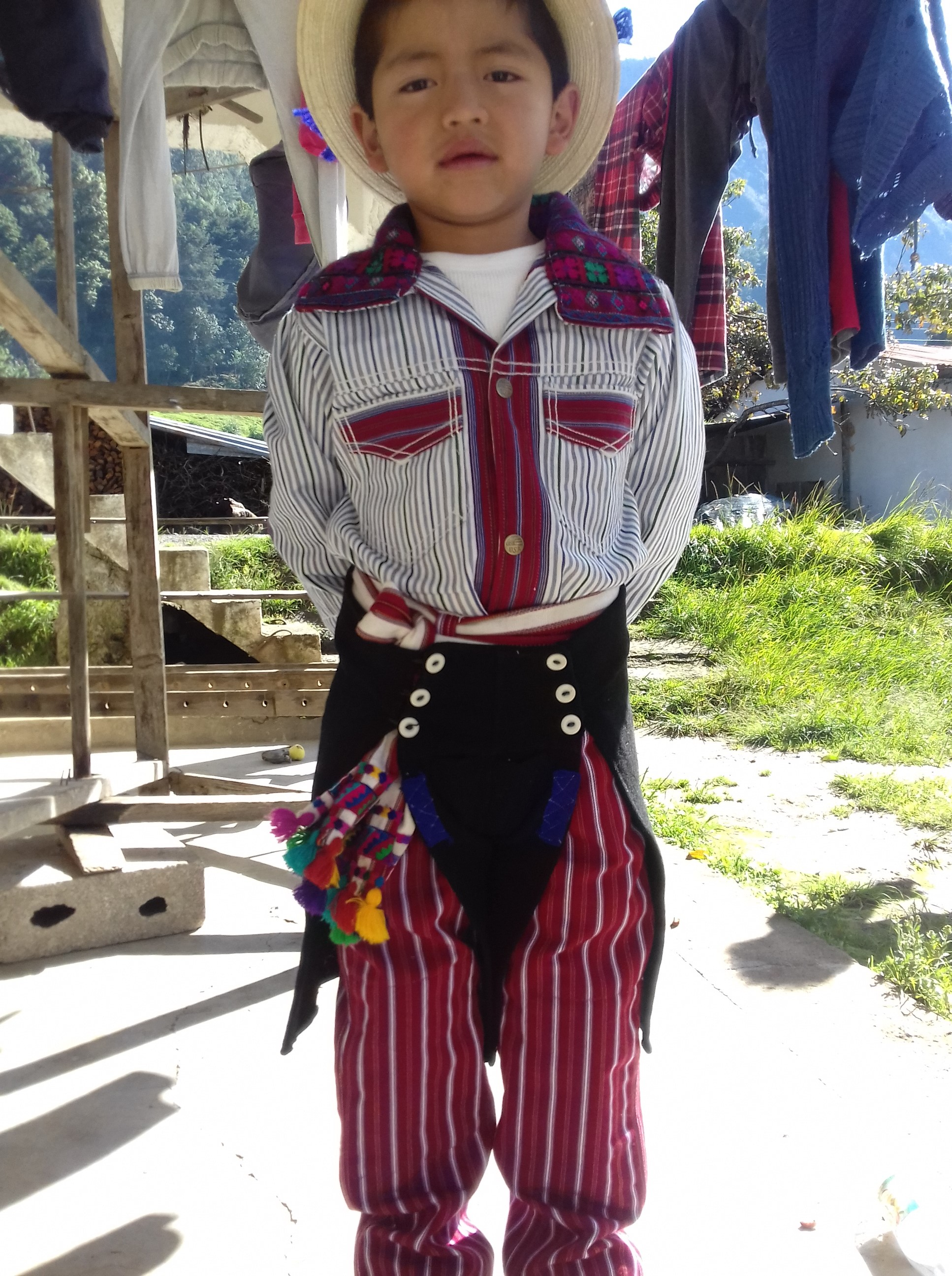 Todos Santos 2019